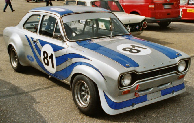 Matti J. Kemiläisen Ford Escort BDA kilpa-auto